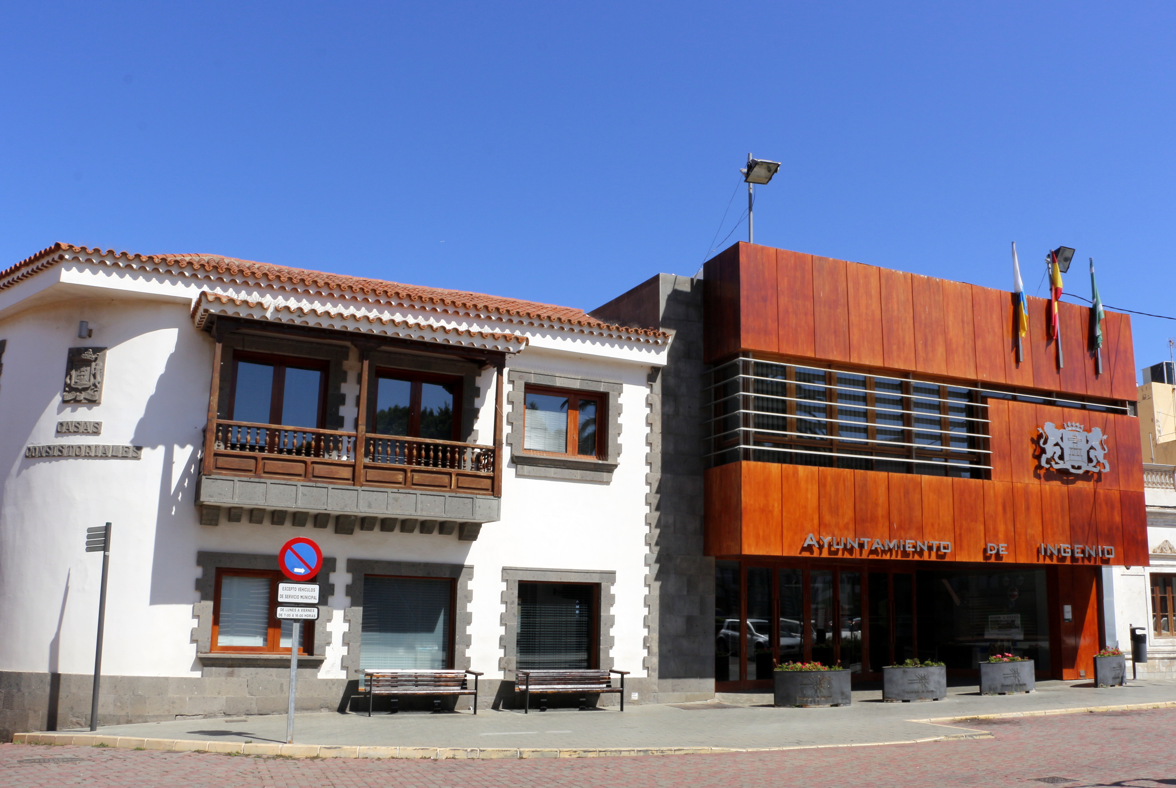 Ilustrísimo Ayuntamiento de la Villa de Ingenio (derecha) y edificio del Archivo Municipal (izquierda)